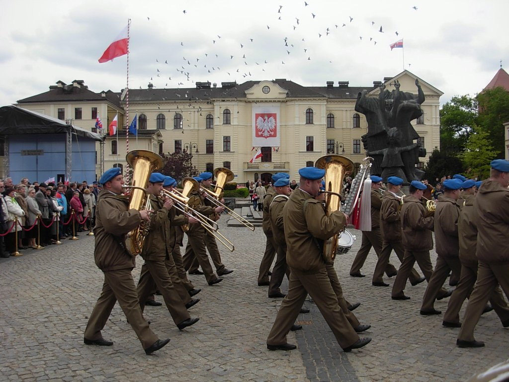 Obchody Święta 3 Maja na Starym Rynku w Bydgoszczy. Występ orkiestry reprezentacyjnej Pomorskiego Okręgu Wojskowego.